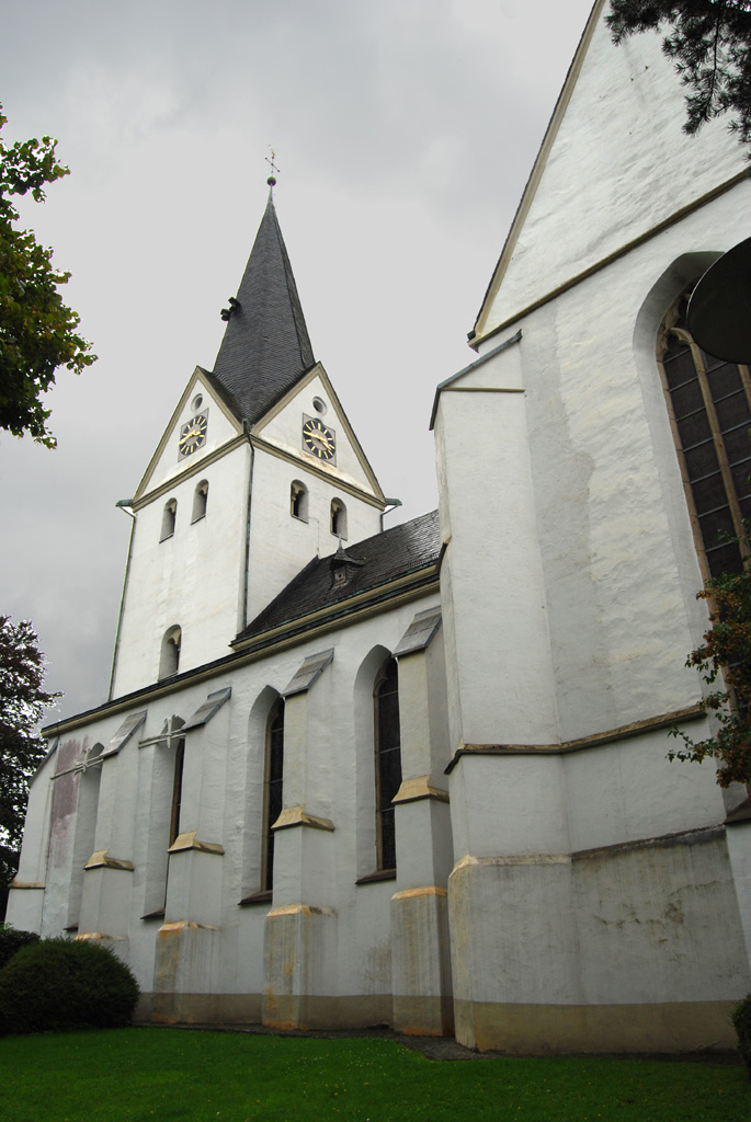 Oberbergischer Dom zu Gummersbach (Blick aus Südosten, Kameraposition 51°1'42.29"N, 7°33'52.23"O)